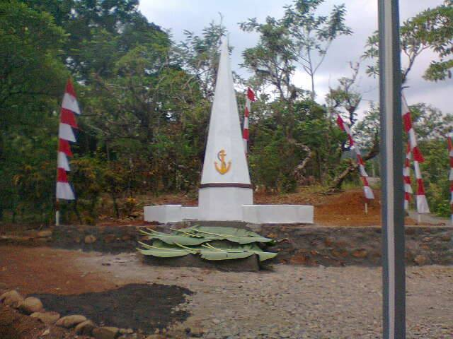 Karang Pucung Monument